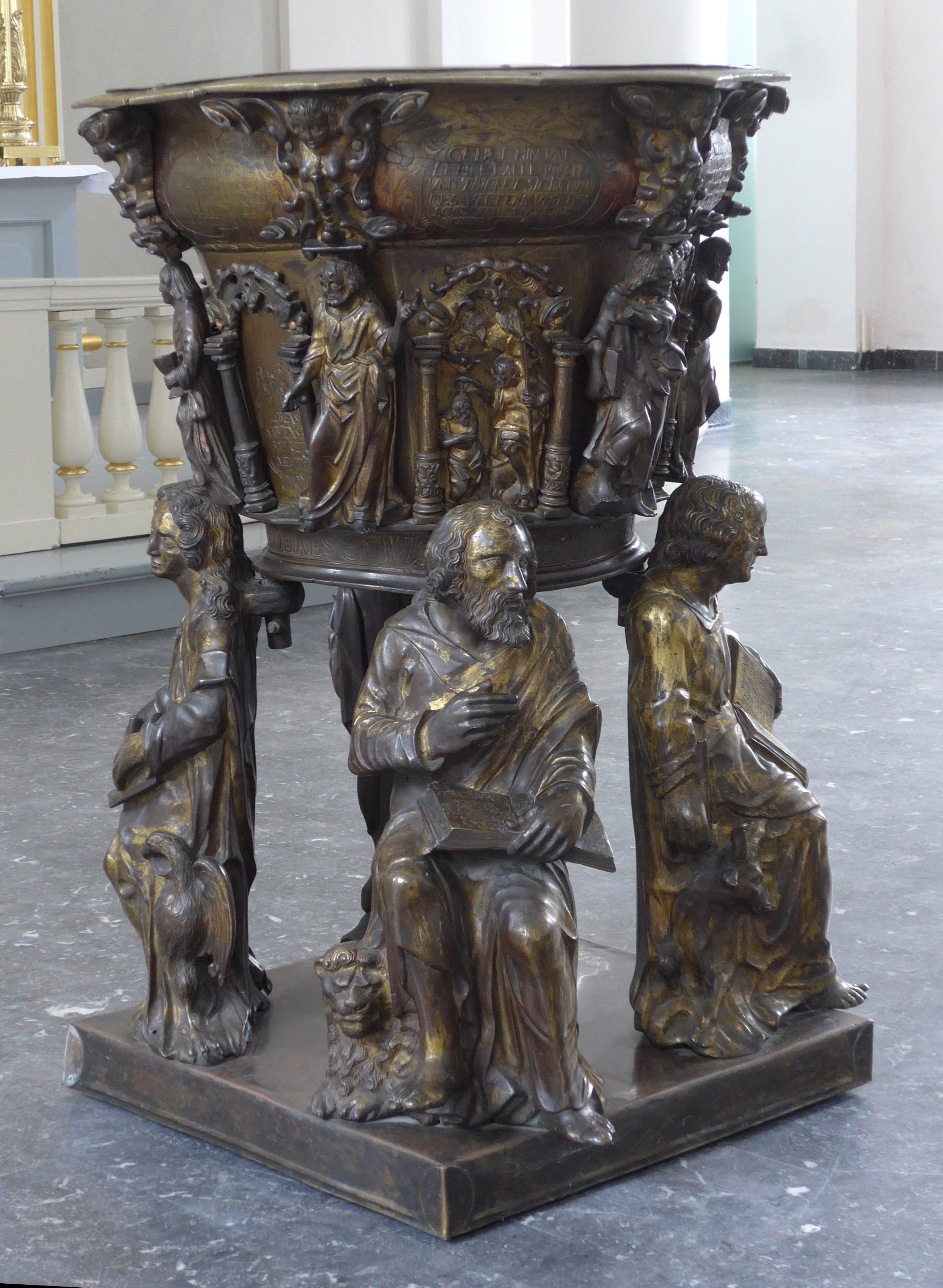 Husum, Ev. Marktkirche, bronzenes Taufbecken von L. Karsten,1643.